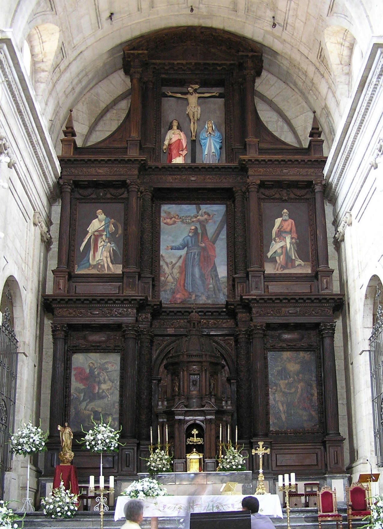 Capilla de Cerralbo. Retablo del altar mayor, en madera de nogal (de Alonso de Barbás), con algunos cuadros como "Bautismo de Jesús" (anónimo) y "Santiago a Caballo" (Francisco Camilo). Ciudad Rodrigo (provincia de Salamanca, España)